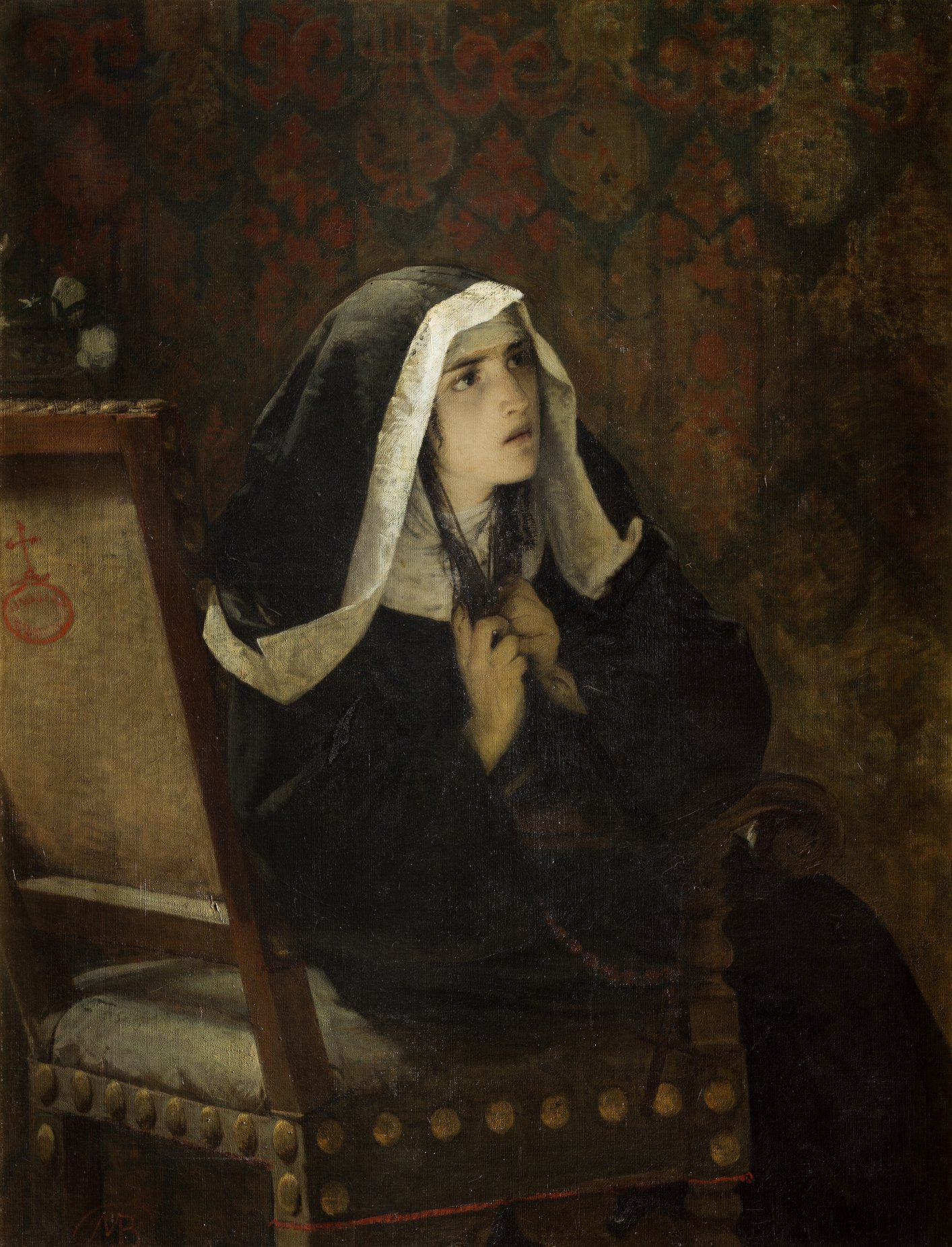 La Signora di Monza, olio su tela, 130 x 98 cm, Galleria d'arte moderna di Milano